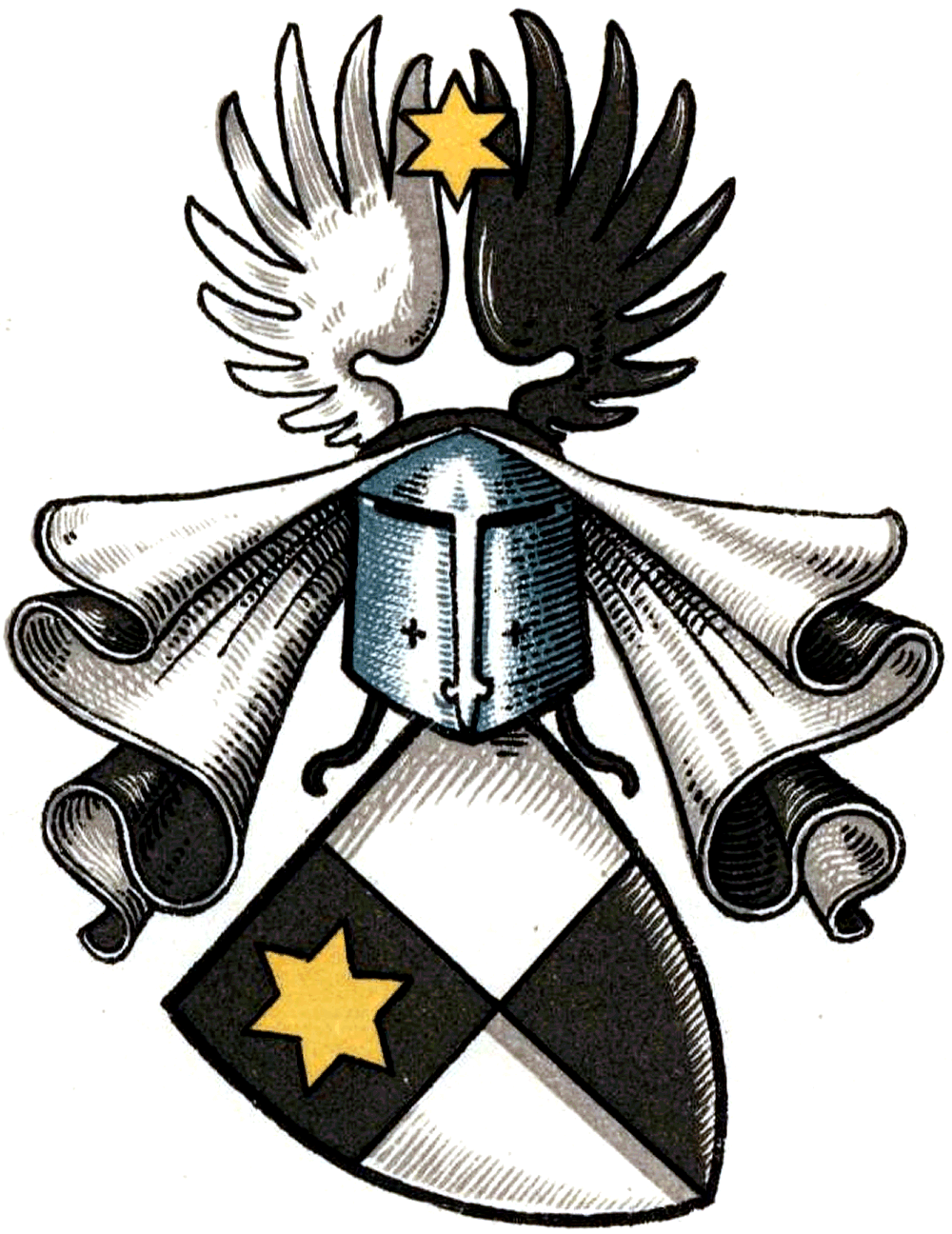 Wappen derer von de Wall oder Dewall